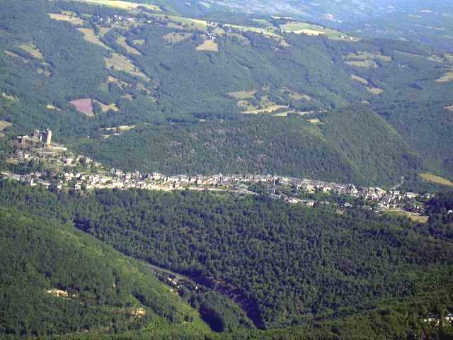 Najac Auteur Xavier Bonnafous (Xulin)